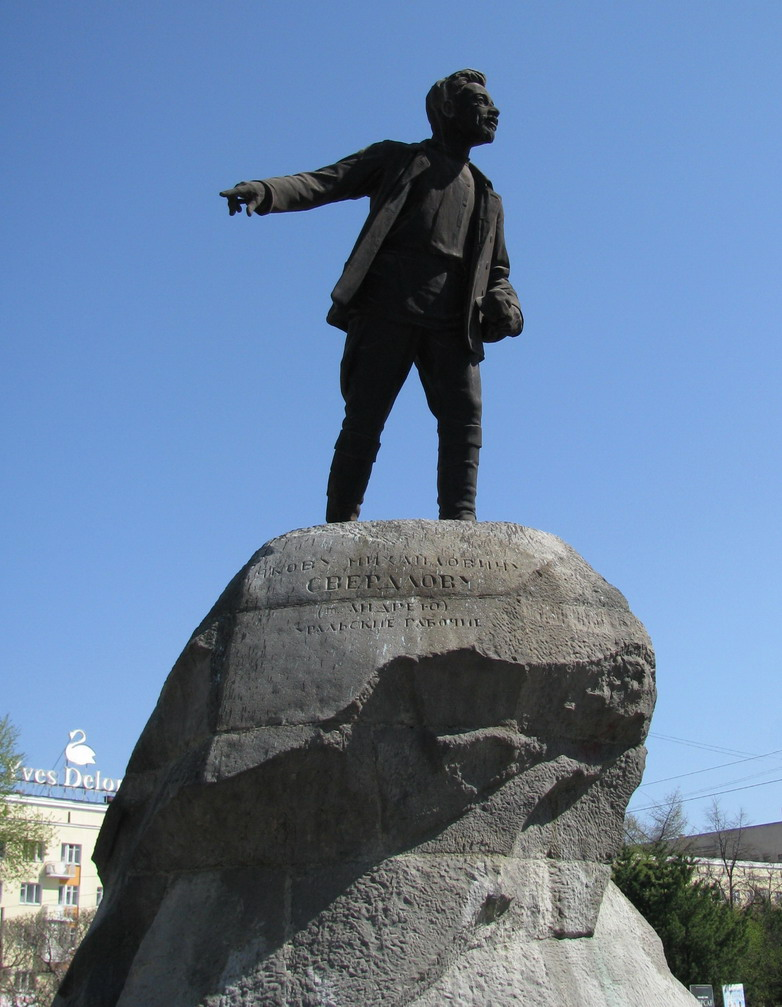 Памятник Я.М. Свердлову на площади Парижской коммуны в Екатеринбурге, установленный в 1927 году.